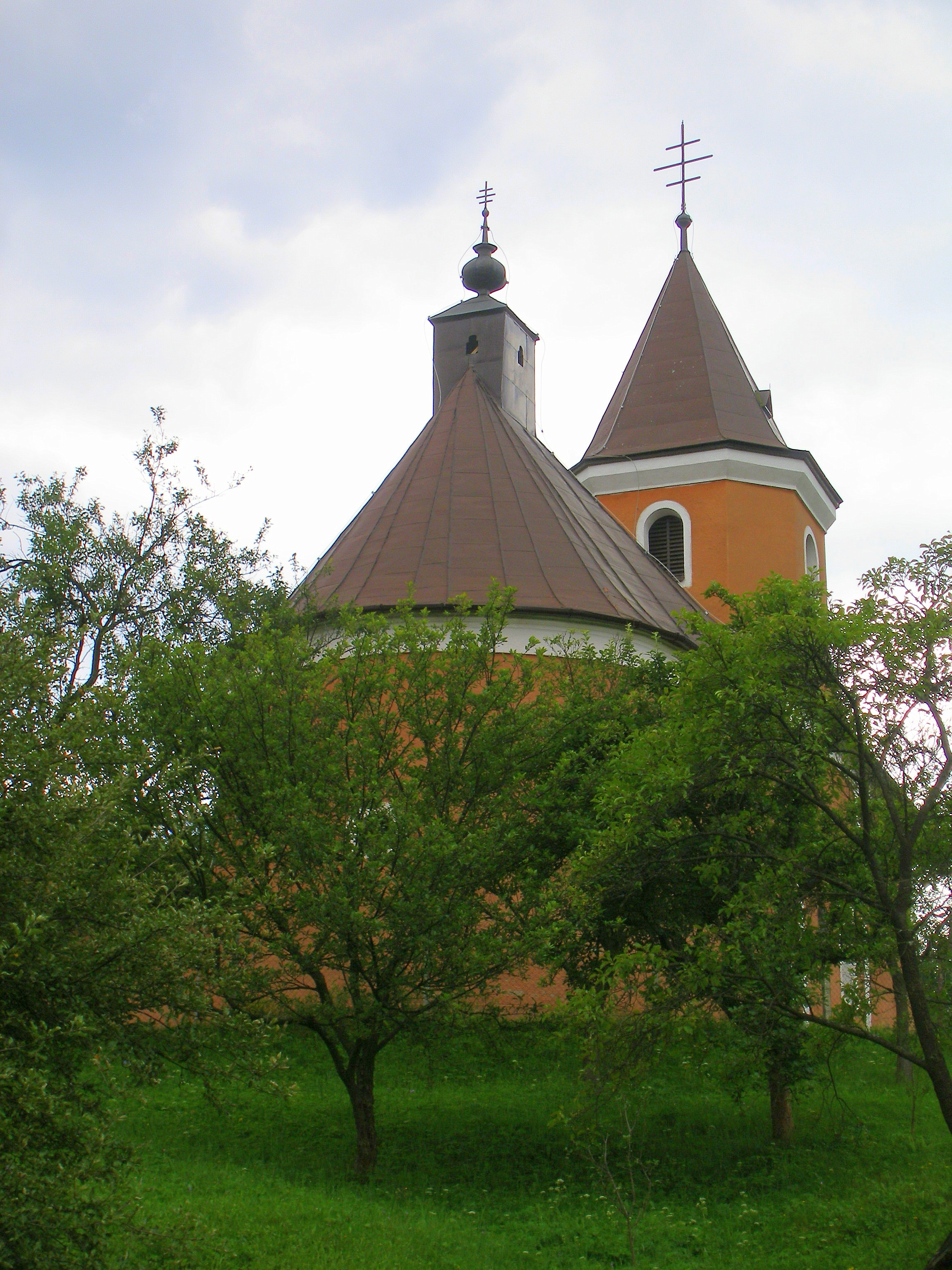 Kvačany obec v Šarišskej vrchovine, okr.Prešov, región Šariš